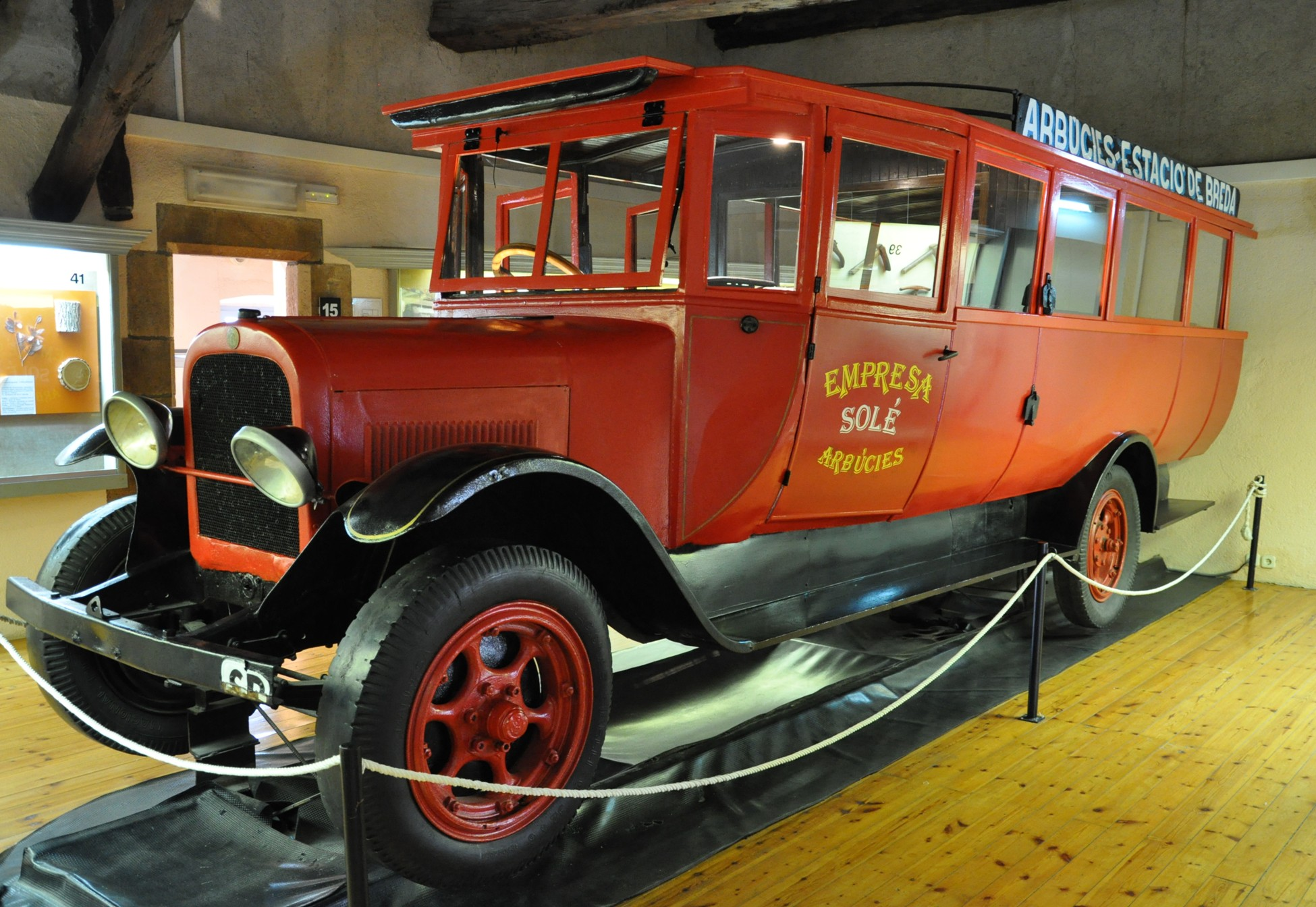 Museu etnològic del Montseny